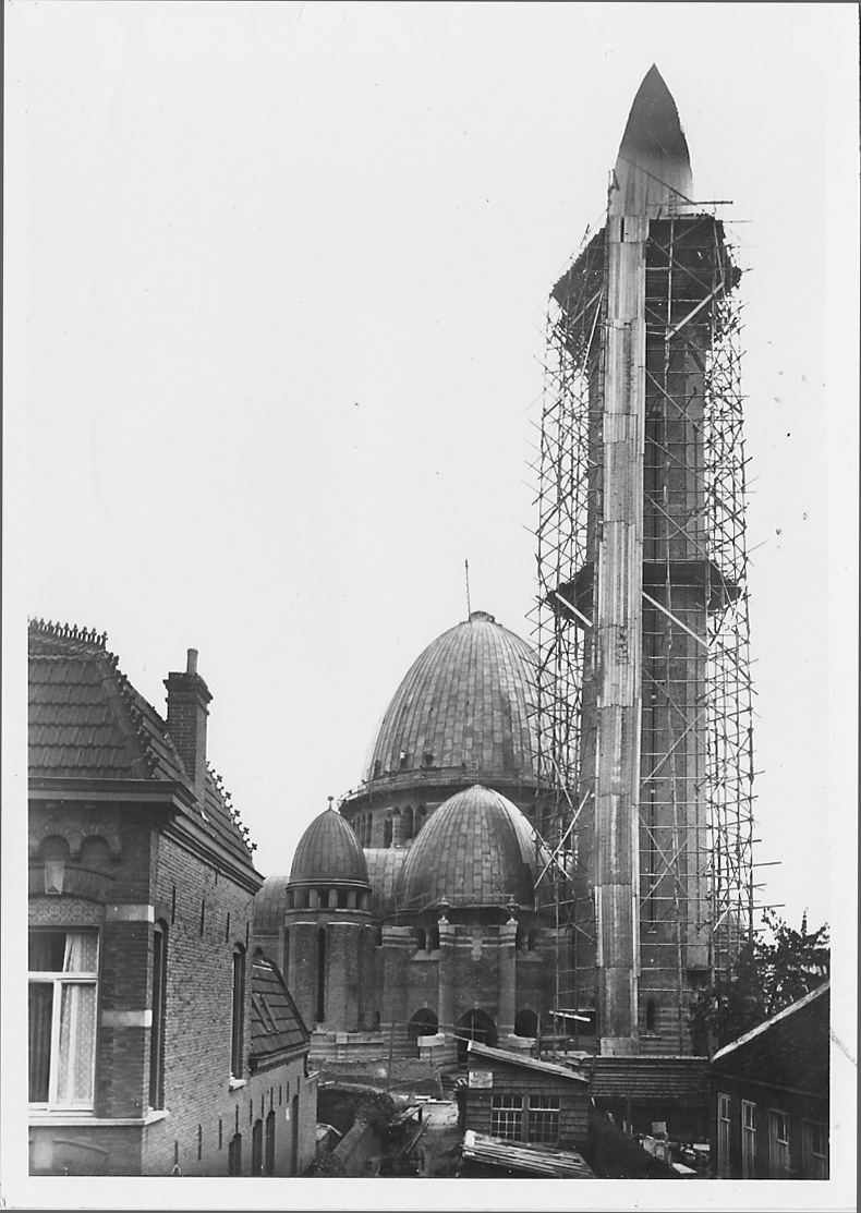 Kerktoren in aanbouw oktober 1924.